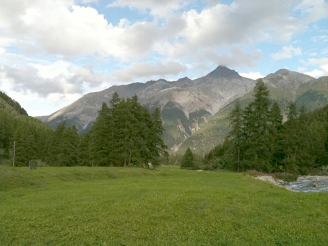 der untere Teil des Val Susauna (politisch: Gemeinde S-chanf)